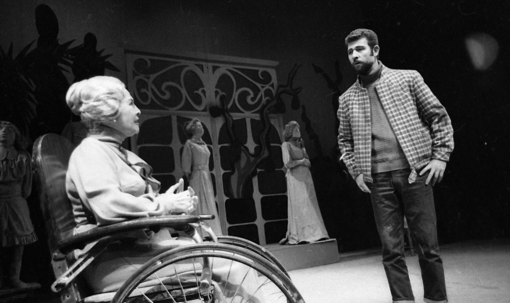 עם חנה רובינא בהצגה דודה ליזה. תיאטרון הבימה 1969